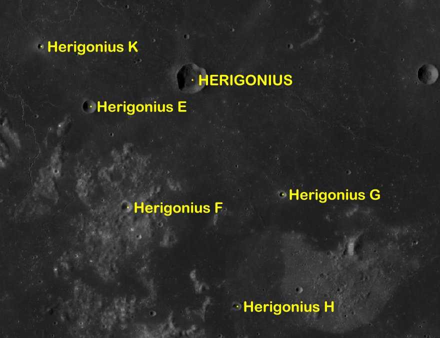 Cráter lunar Herigonius. Cráteres satélite. (Imagen LRO)